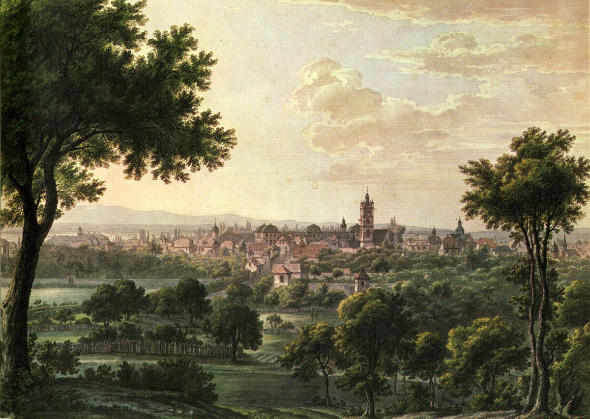 Darmstadt, Ansicht vom Riedeselberg aus (Südwesten)